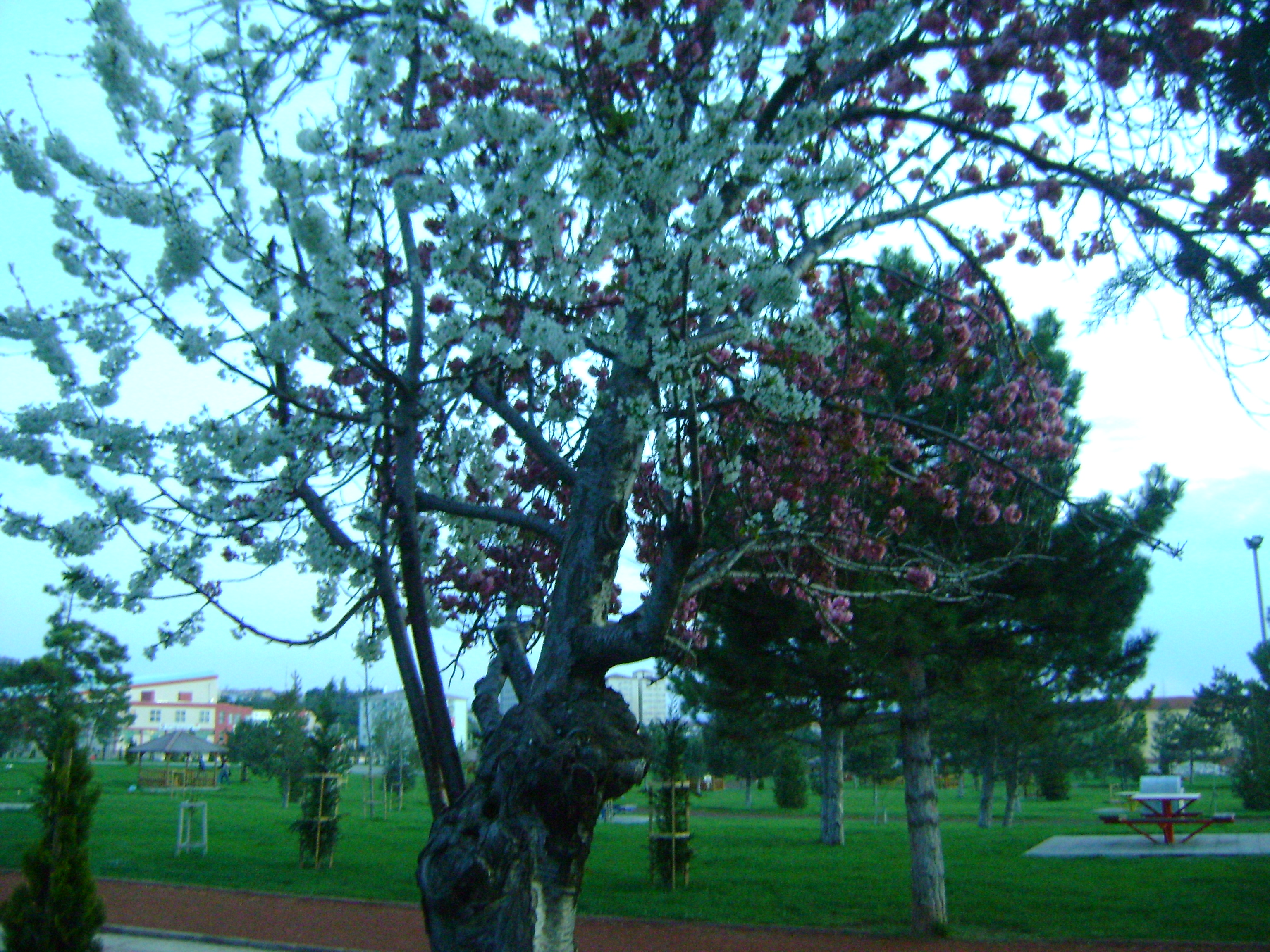 Çorum kent fuarı yanında yer alan parklı alan.